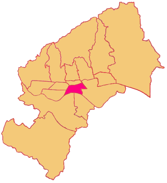 Map of Trnje District in Zagreb (Gradska četvrt Trnje)